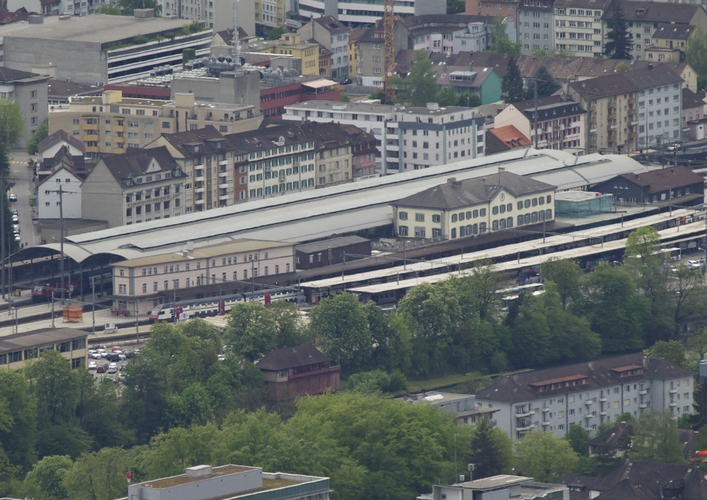 Der Bahnhof Olten, wie er von der Geissflue aus zu sehen ist. Im Vordergrund - auf der linken Seite der Aare - das Kantonsspital Olten, oben rechts im Bild Gebäude des Berufsbildungszentrums Olten.